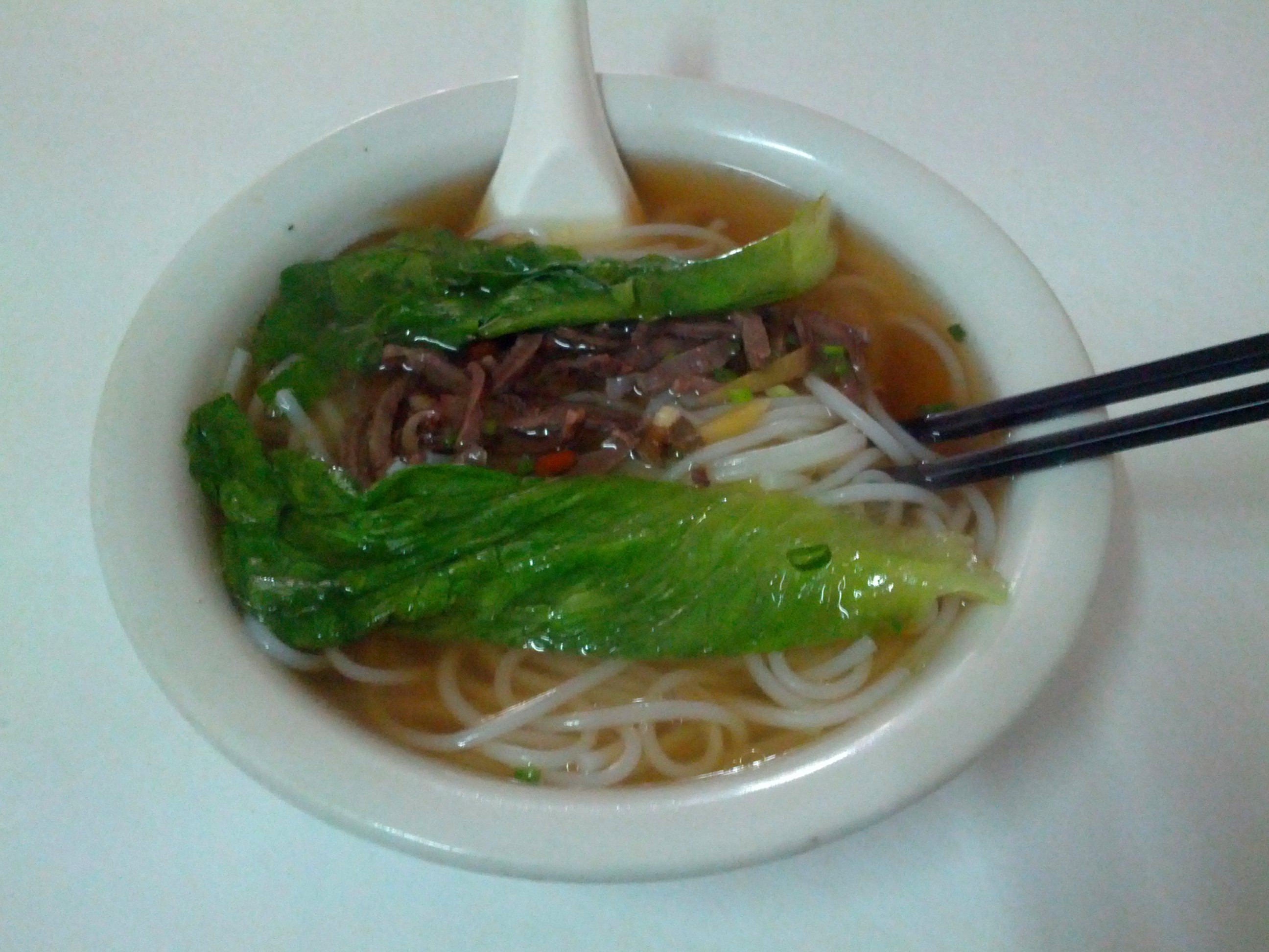 中文（中国大陆）: 福山莴苣（大陆妹）